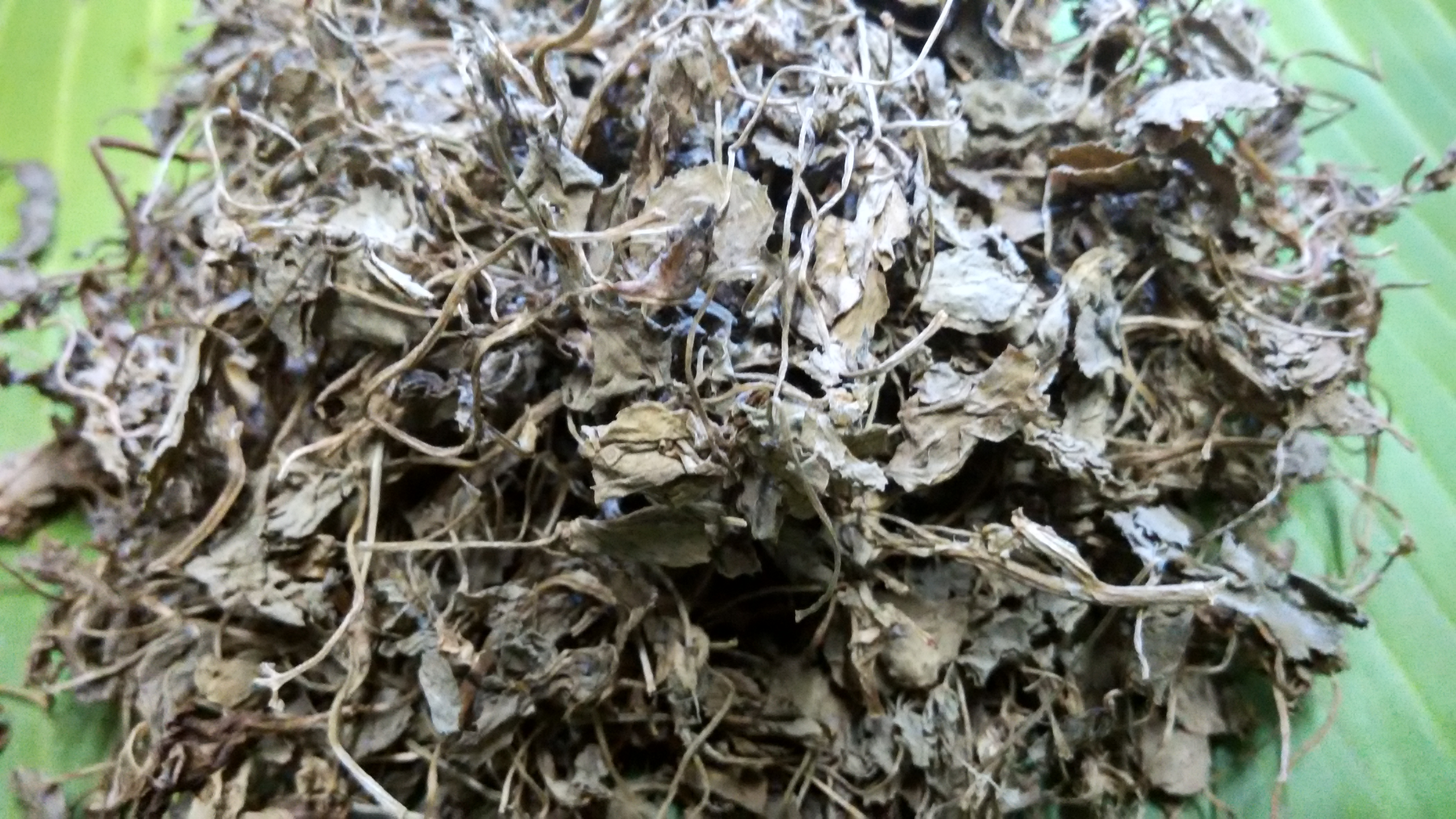 வெந்தயத்தின் உலர் இலைகள்.